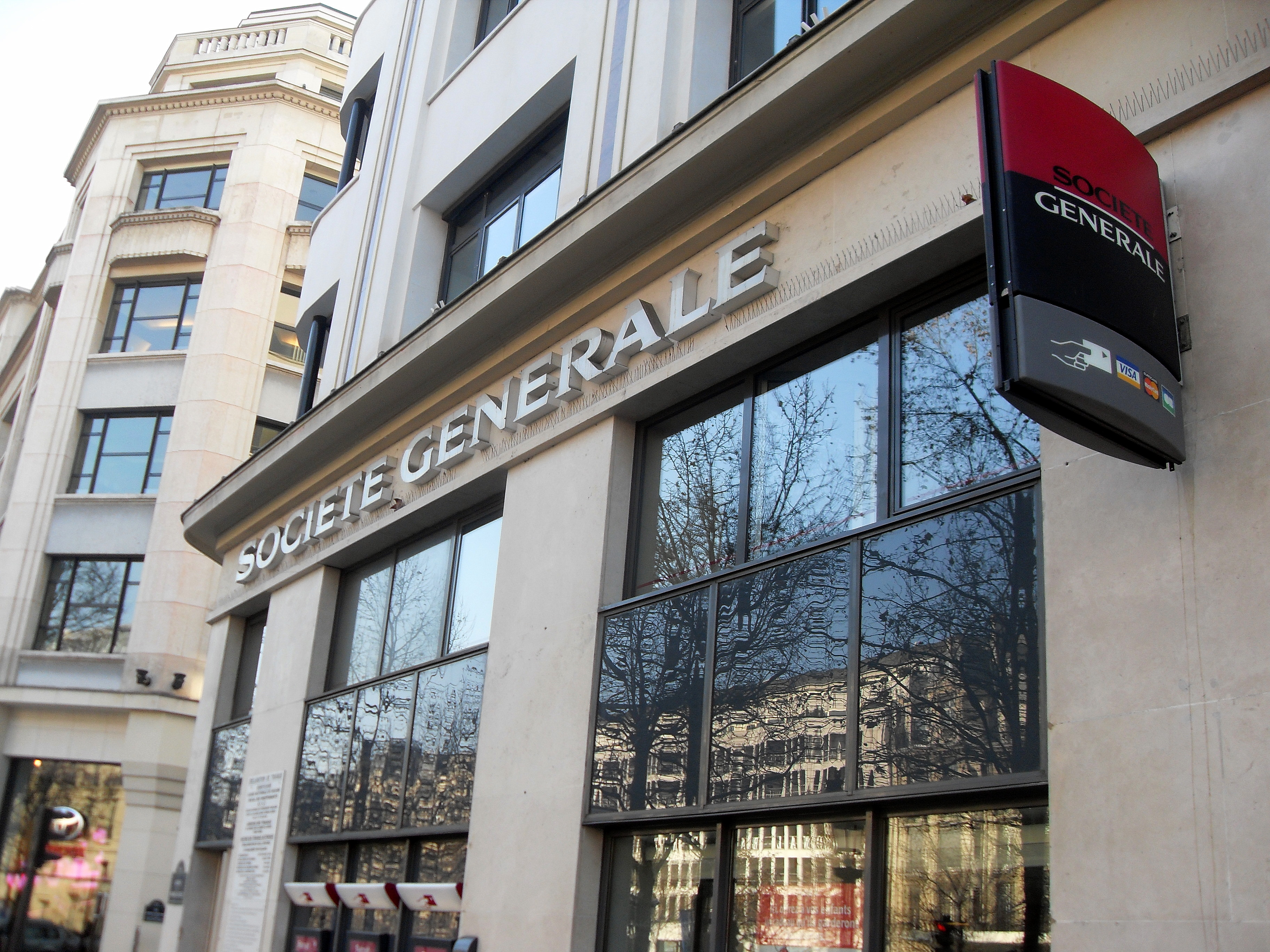 Un edificio del banco Société Générale en Champs-Elysees Paris.